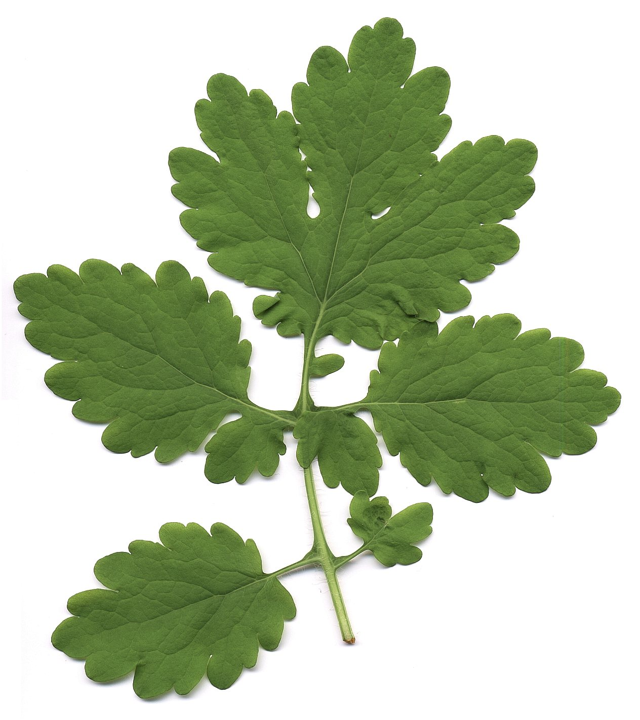 Chelidonium majus - leaf (scan)